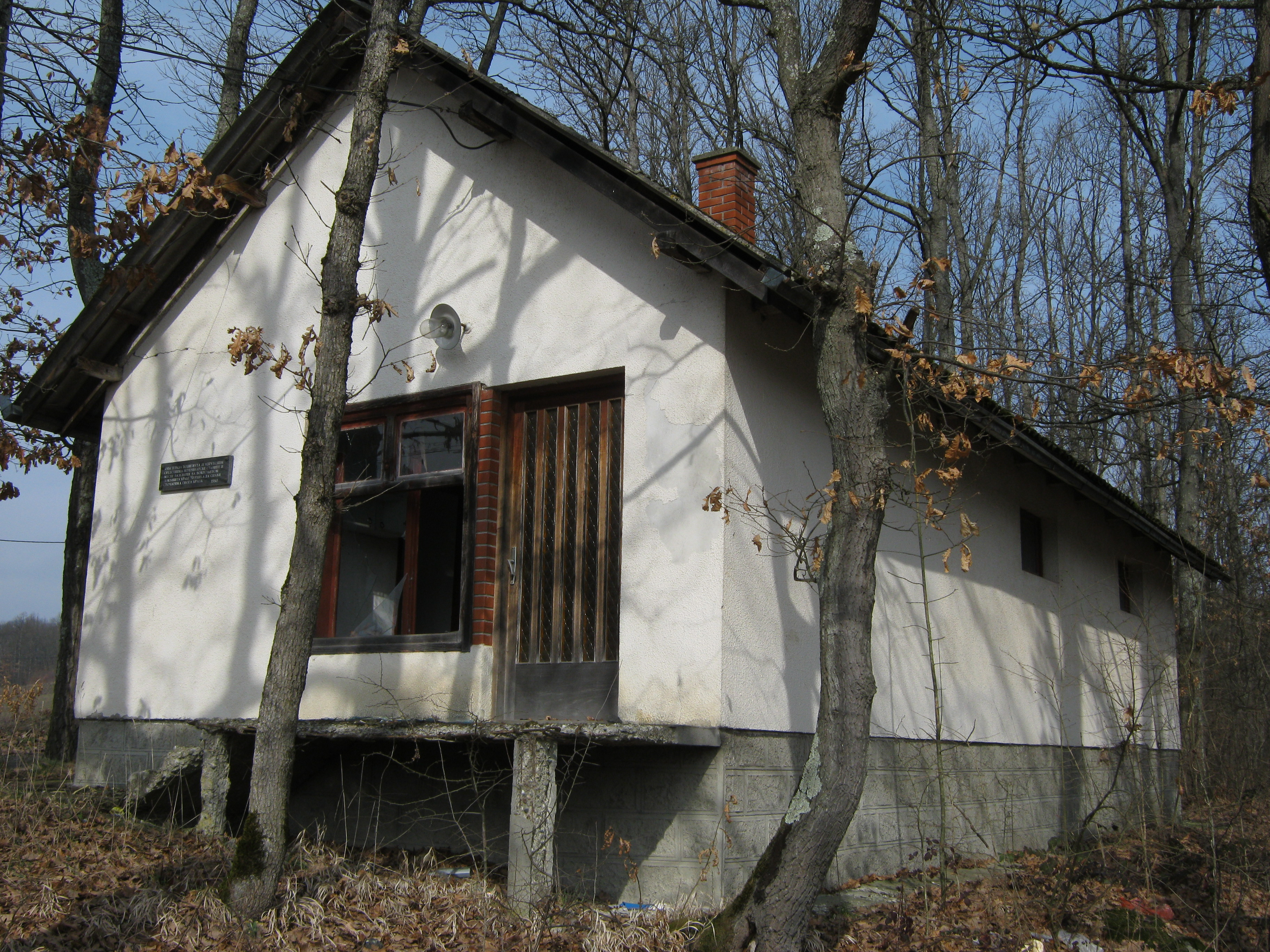 У циљу заштите сточног фонда, становници Шарана и Дренове су заједничким средствима саградили зграду ветеринарске амбуланте између два села, на локацији Маџарско гробље, која је од 1980. радила као испостава милановачке ветеринарске станице. Ова зграда одражавала је спремност локалног становништва да се удруже и раде у добробит свих сељака. Ветеринарска амбуланта затворена је почетком 21. века због све мањег броја домаћинстава која се баве сточарством. На слици се види последица немара и дивљаштва појединаца.